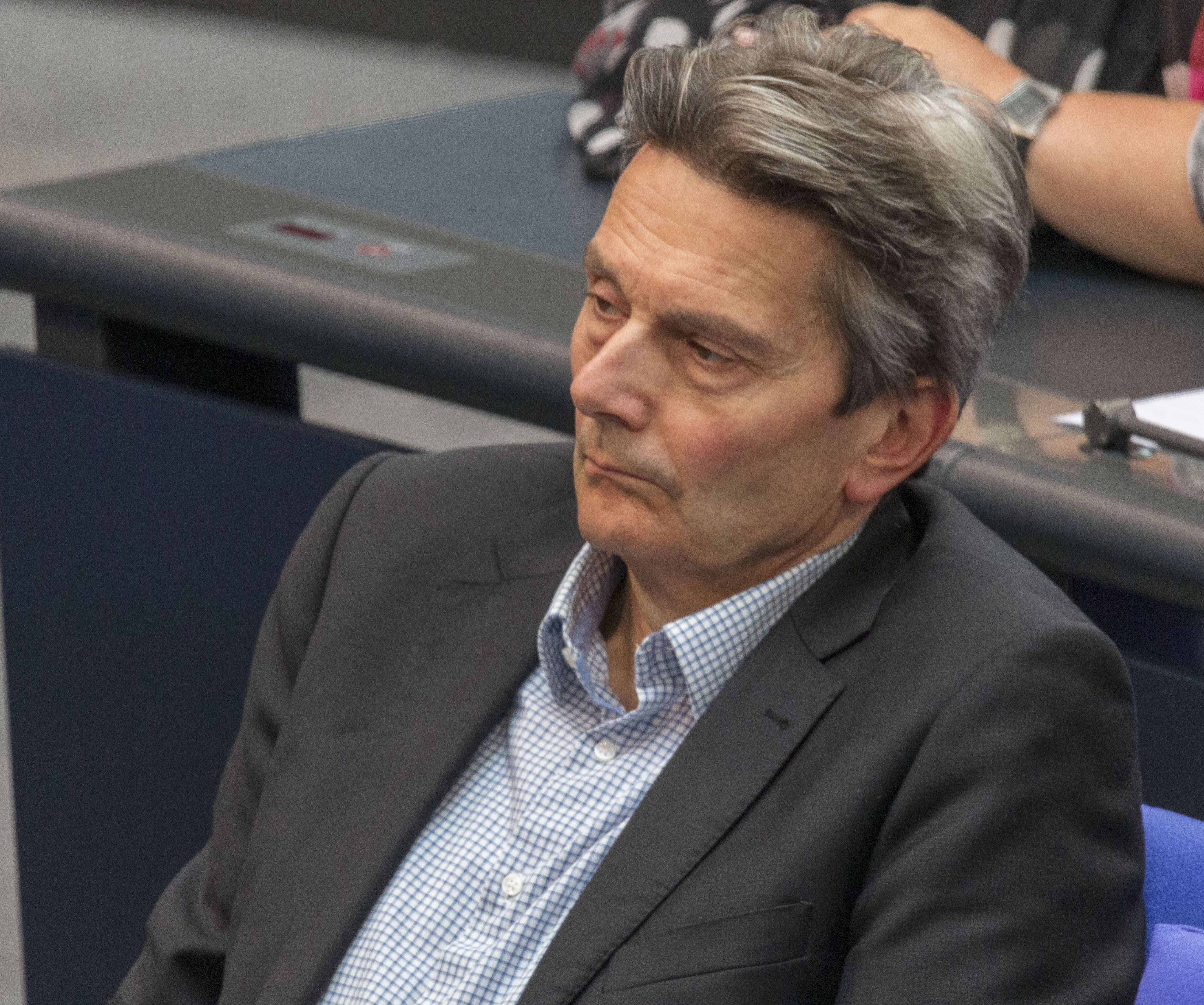 Rolf Mützenich, Bundestagsabgeordneter der SPD während der Plenarsitzung des Deutschen Bundestages am 2. Juli 2020 in Berlin.